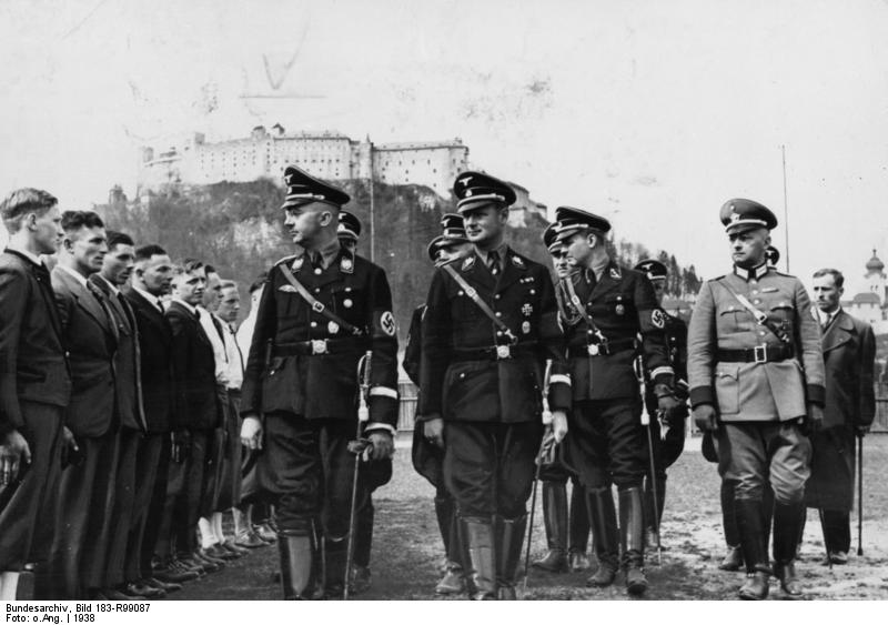 Heinrich Himmler in Salzburg Zentralbild Reichsführer SS Heinrich Himmler besucht österreichische SS in Salzburg 1938, rechts neben Himmler SS-Gruppenführer Karl Wolff. [Scherl Bilderdienst] Abgebildete Personen: Himmler, Heinrich: Reichsführer der SS, Deutschland (GND 11855123X) Wolff, Karl: SS-Obergruppenführer, General, Adjutant Heinrich Himmlers, 1964 vom Schwurgericht München zu 15 Jahren Zuchthaus verurteilt, Bundesrepublik Deutschland